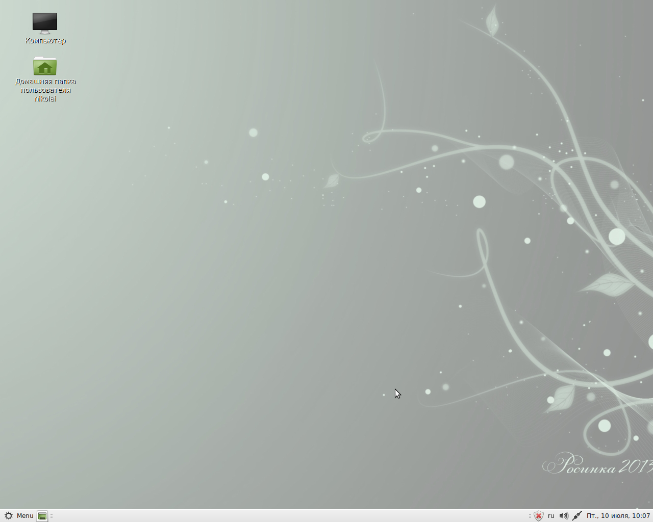 Linux Mint Росинка 2013 альфа